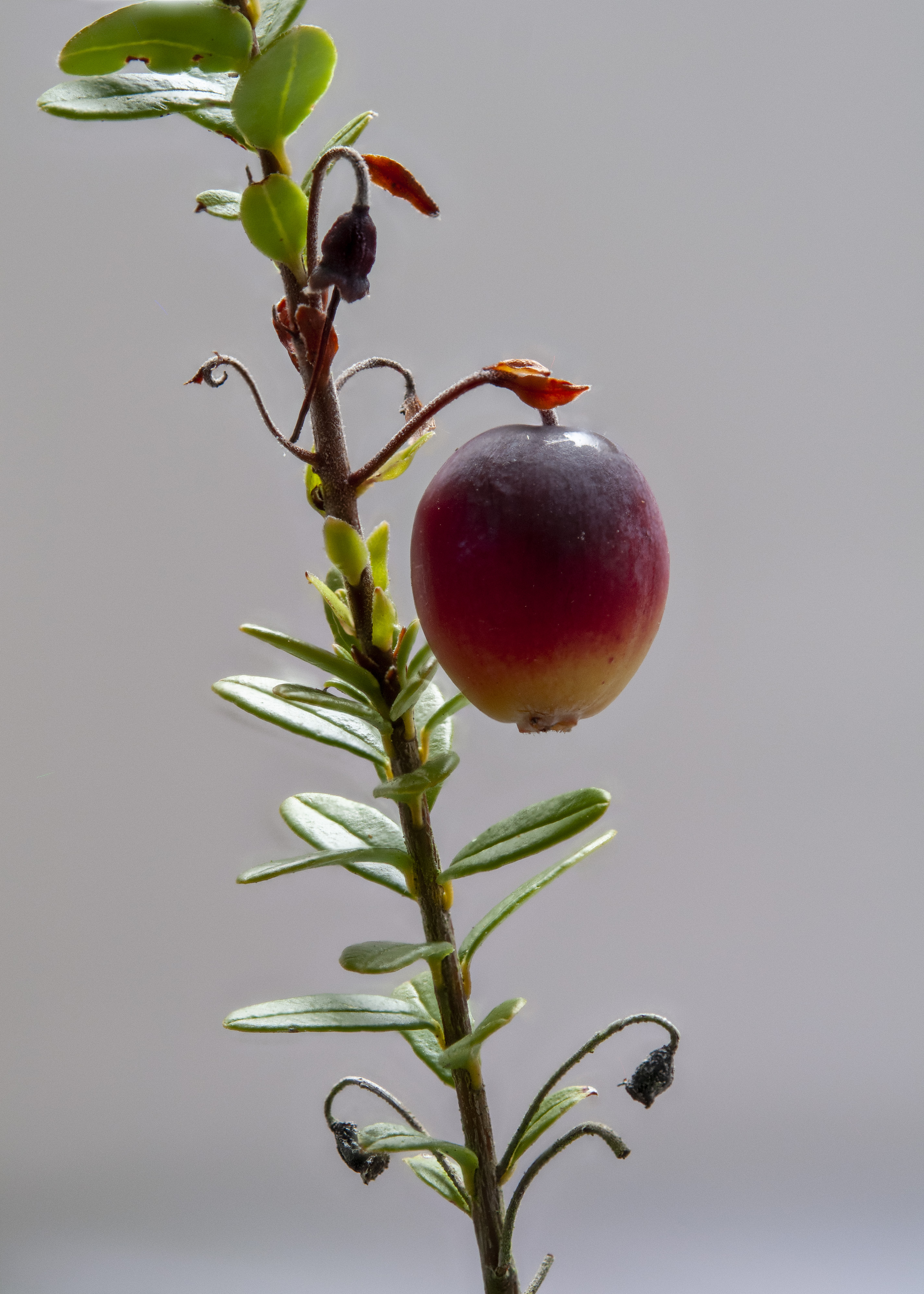 Cranberry of grote veenbes. Diameter bes 9 mm. Foto genomen in België